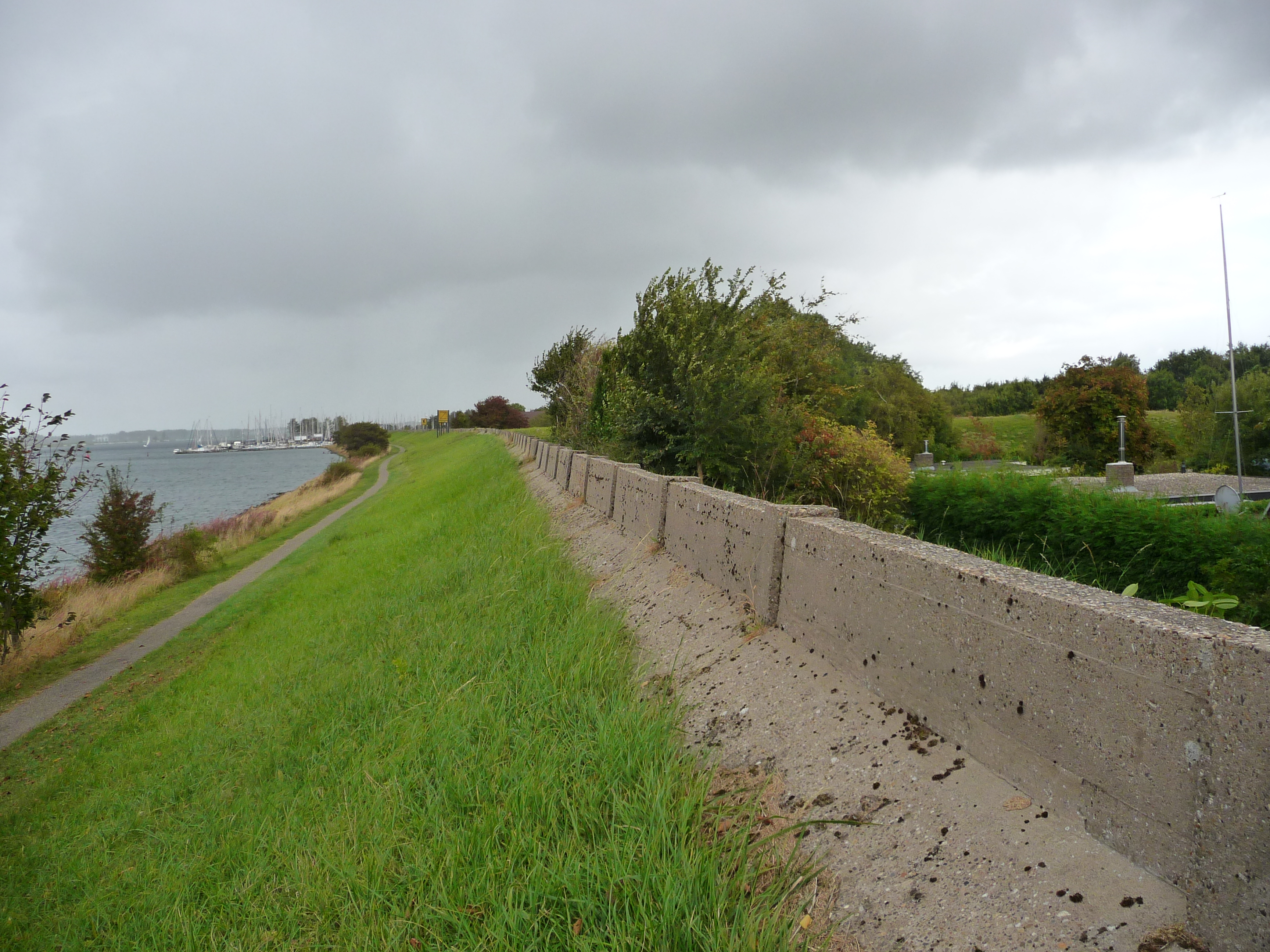 Muraltmuurtje in the dutch province of Zeeland near Wolphaartsdijk